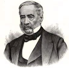 Philippe Aubert de Gaspé (30 octobre 1786–29 janvier 1871) est un écrivain de langue française né à Québec, auteur des Anciens Canadiens. Gravure publiée dans Histoire des Canadiens-Français, de Benjamin Sulte, Wilson & Cie éditeurs, Montréal, 1882-1884. Gravure faite par un auteur non identifié, d'après une photographie de 1863-1864 par Livernois. [1]